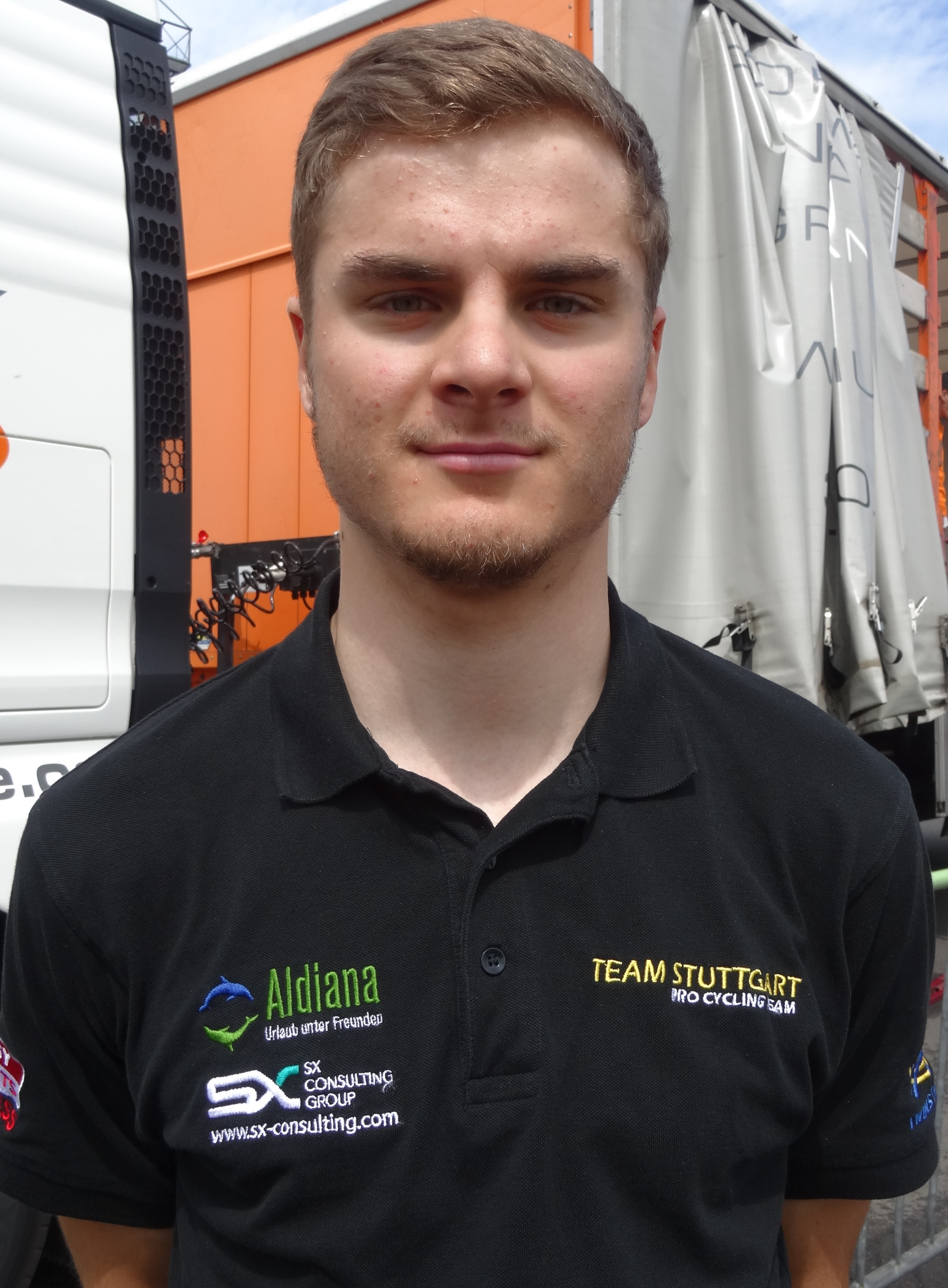 Reportage réalisé le dimanche 8 juin à l'occasion du départ du Mémorial Philippe Van Coningsloo 2014 à Wavre, Belgique.